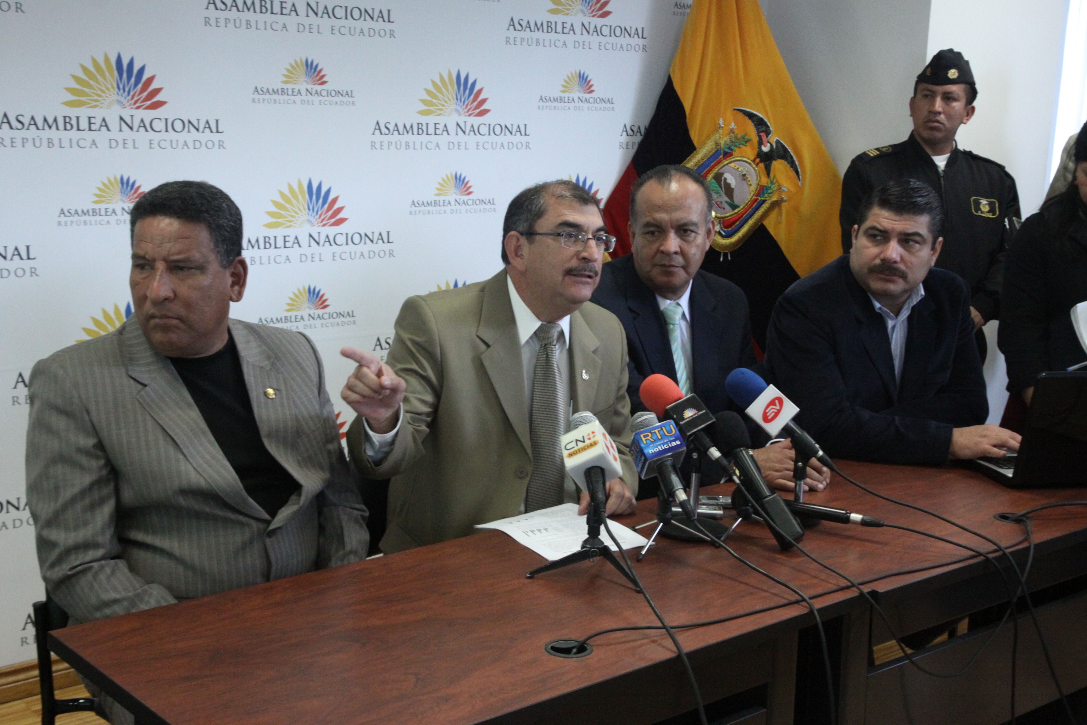 Foto: Hugo Ortiz Ron / Asamblea Nacional